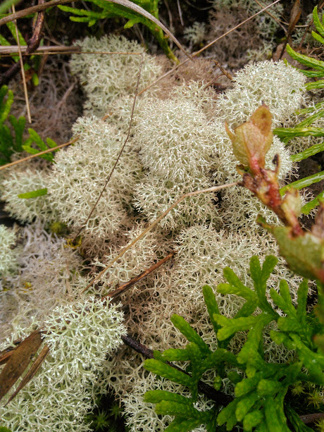 Cladonia stellaris en Boyaca, Colombia